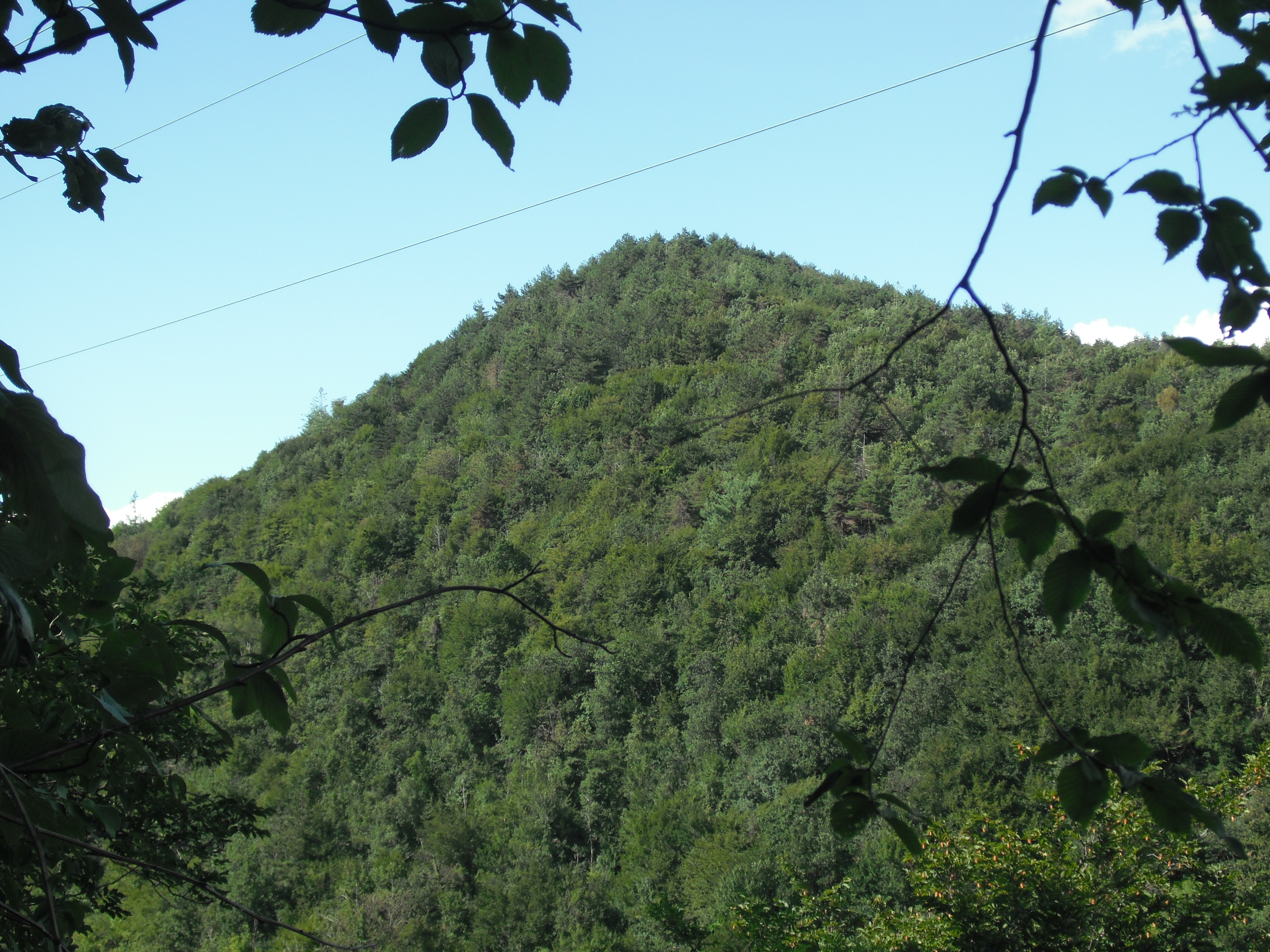 Il Collalto visto da sudovest.